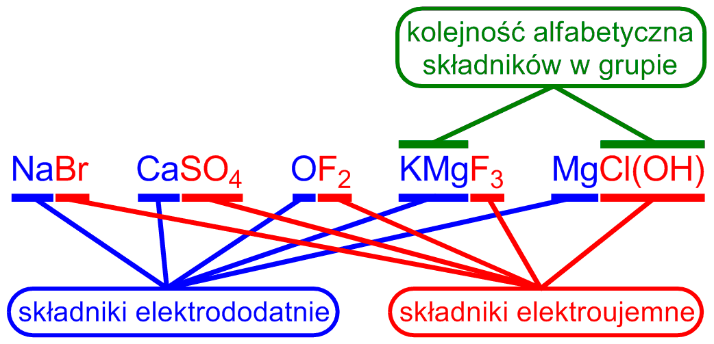 Kolejność zapisu pierwiastków we wzorze chemicznym